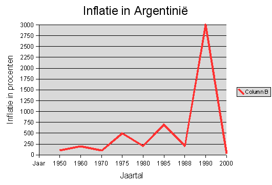 Vereenvoudigde grafiek over de inflatie in Argentinië. Gemaakt met 2 (beta).